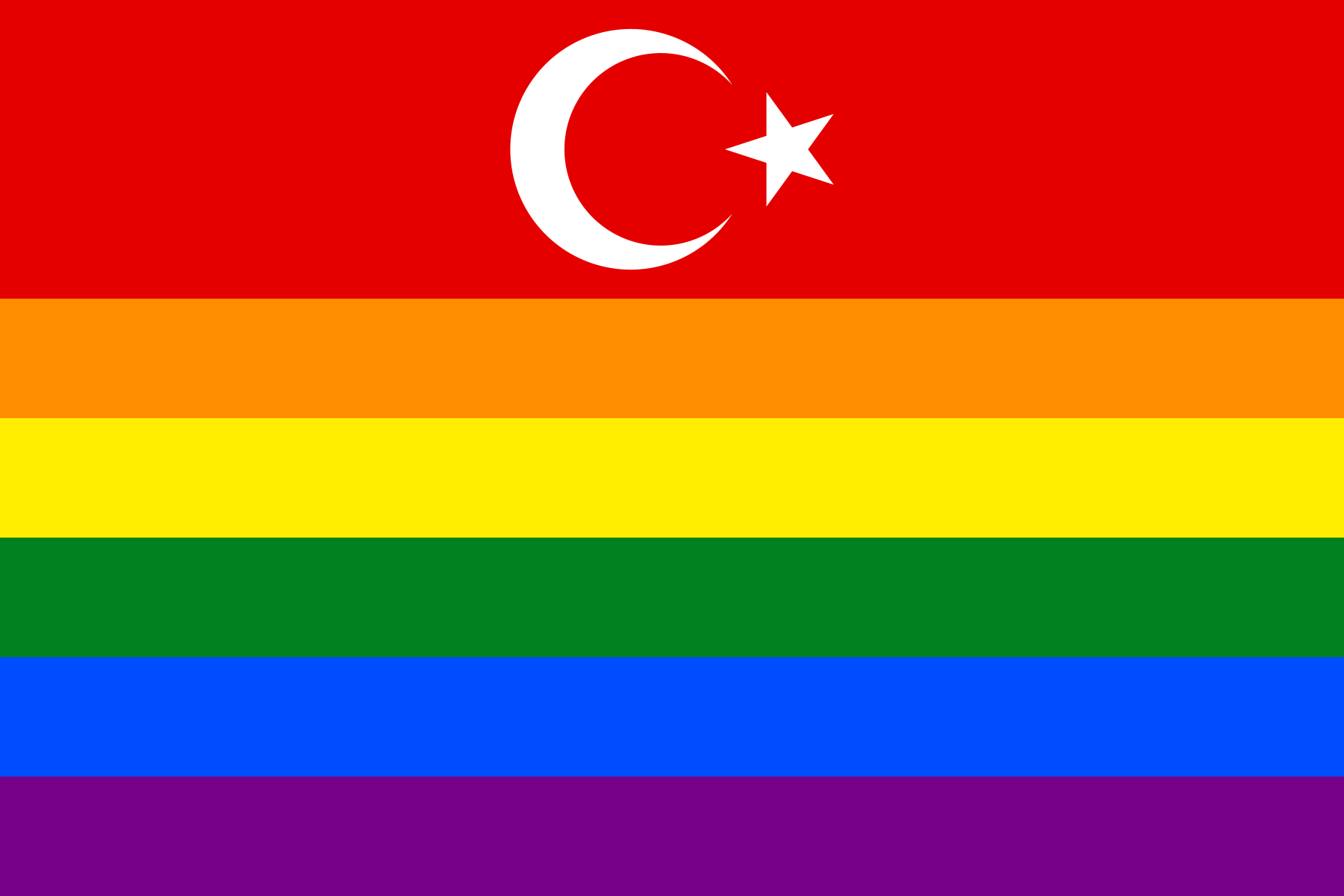 Türkiye'deki LGBT Bireyler için oluşturulan serbest bir çalışma.